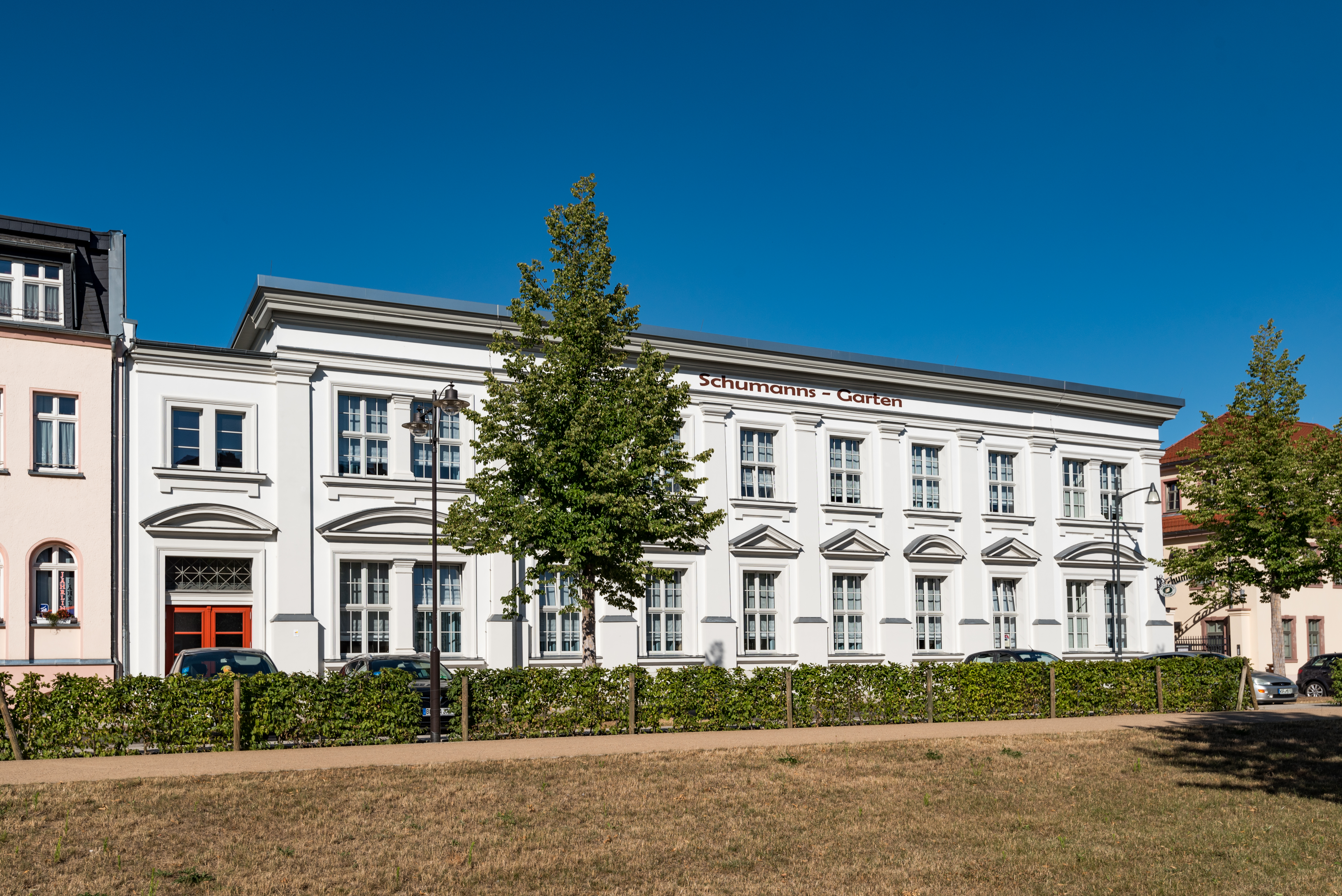 Weißenfels, Promenade 11